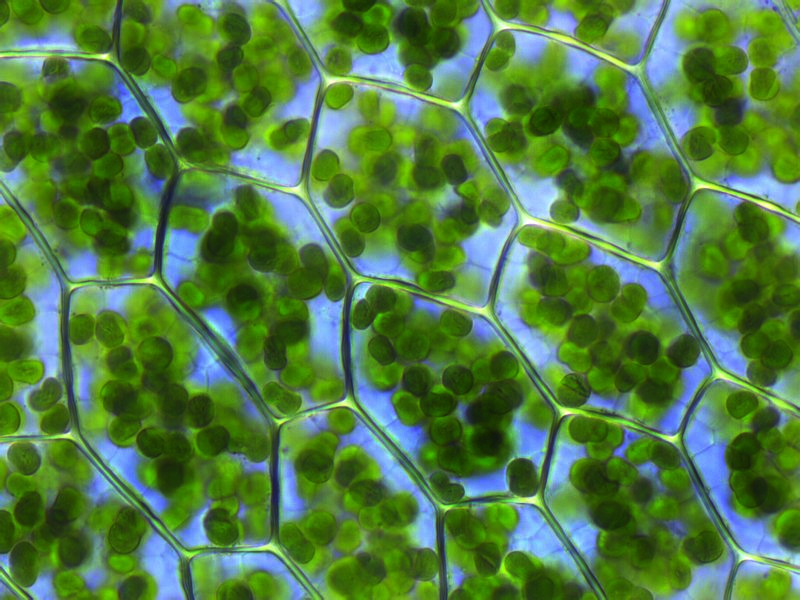 Plagiomnium affine, Laminazellen, Rostock